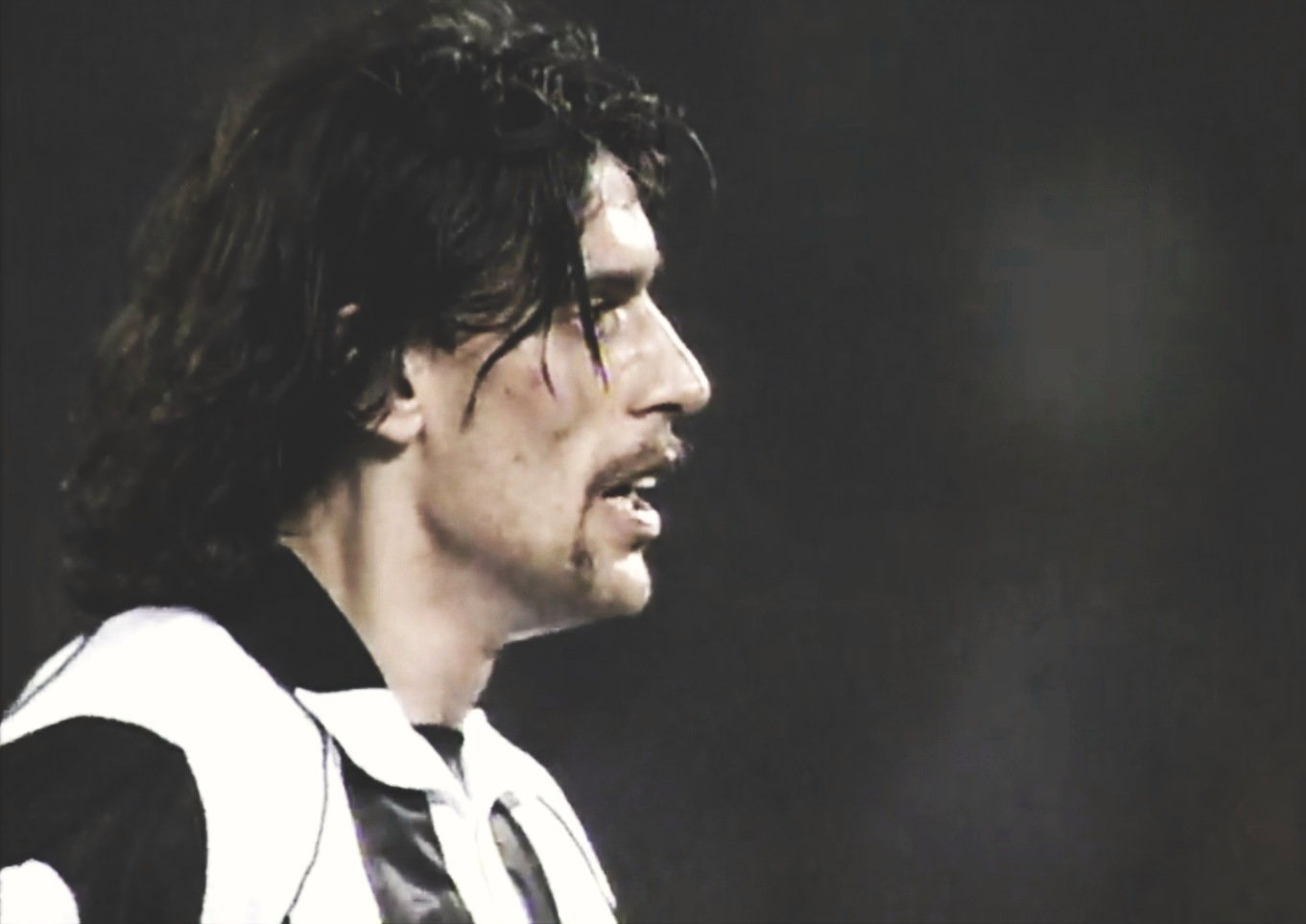 Il calciatore italiano Moreno Torricelli alla Juventus della stagione 1997-1998.